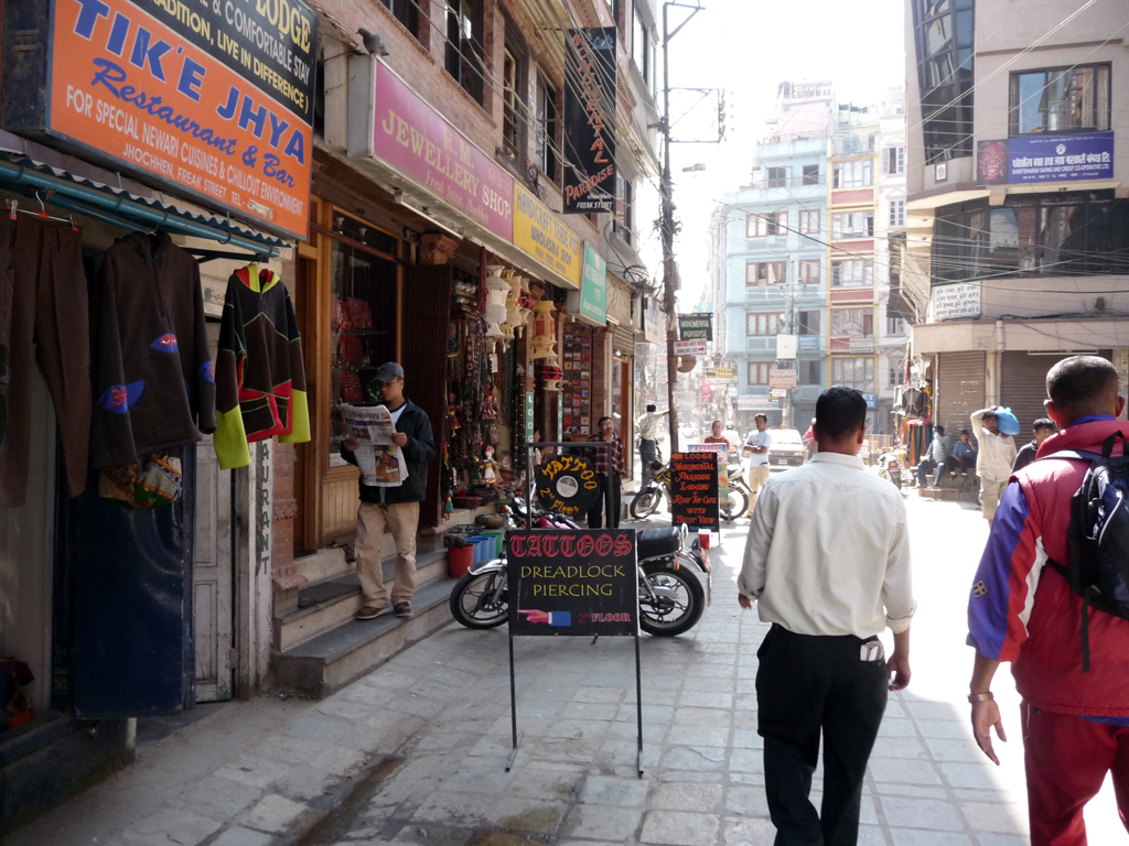 Durbar Square, Kathmandu